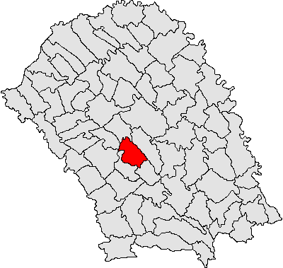 Categorie:Hărţi ale judeţului Botoşani